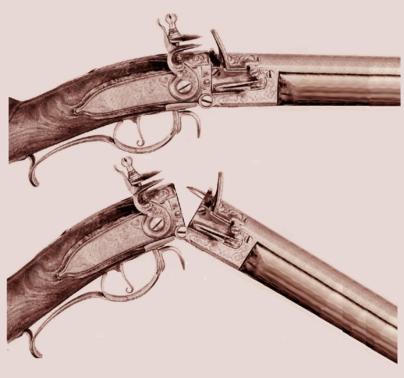 Kipplauf Steinschloss flinte